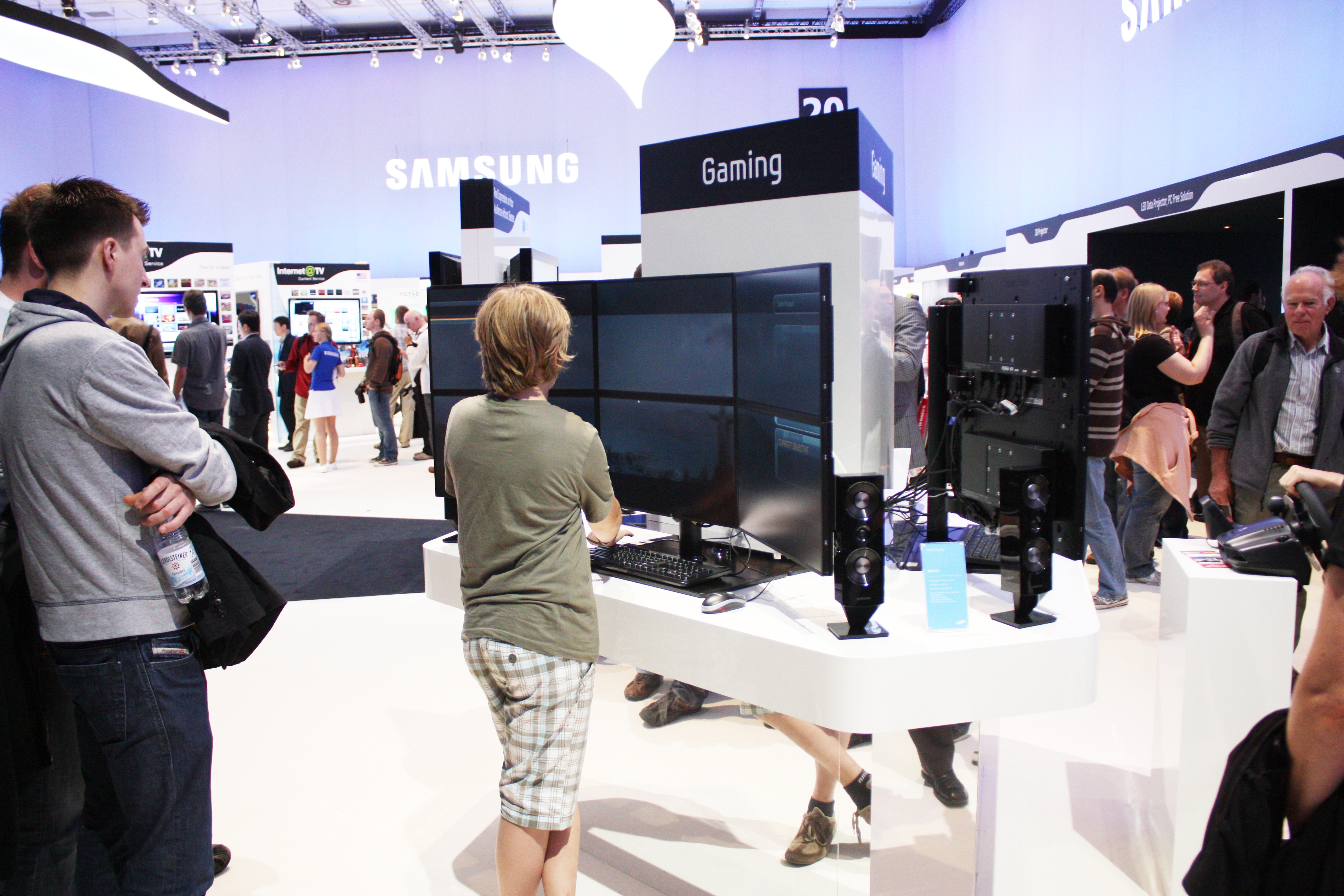 IFA 2010, Berlin; 6 Monitore, 6 Bildschirme